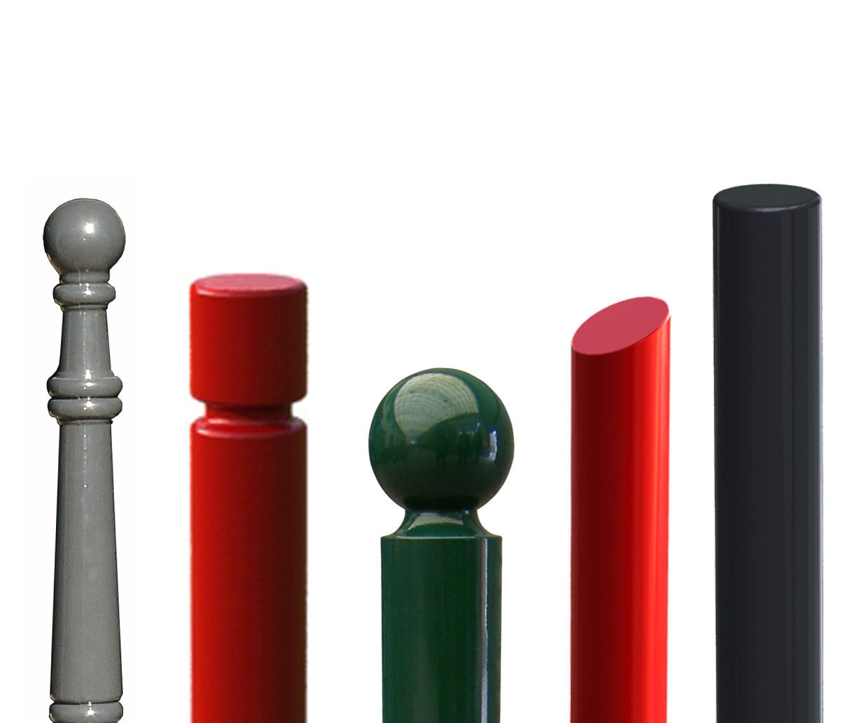 Différents potelets de ville destinés à sécuriser les trottoirs.